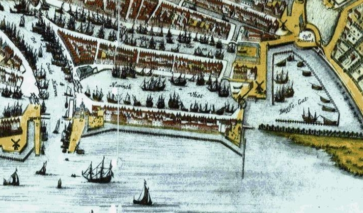 Detail van het Haringvliet in Rotterdam van de kaart van 1652.